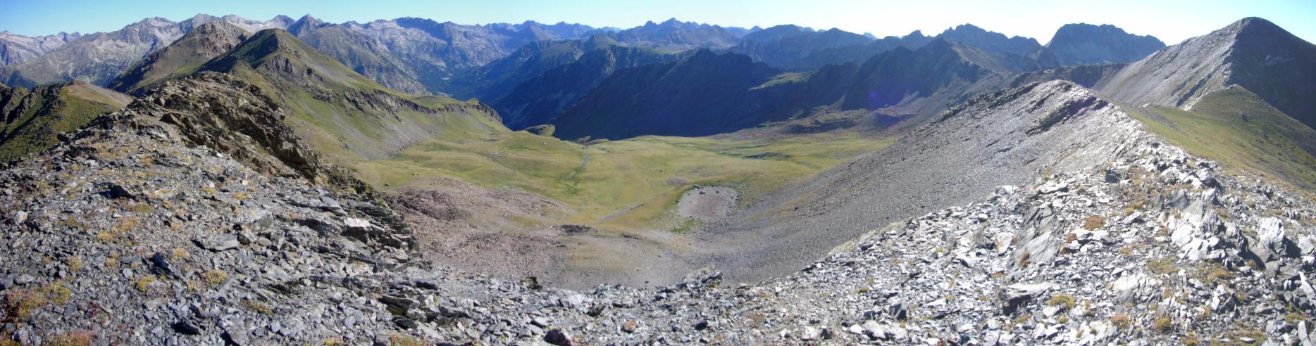 Montanyó de Llacs vist des del Pic de les Costes; la Vall de Boí, Alta Ribagorça, Catalunya